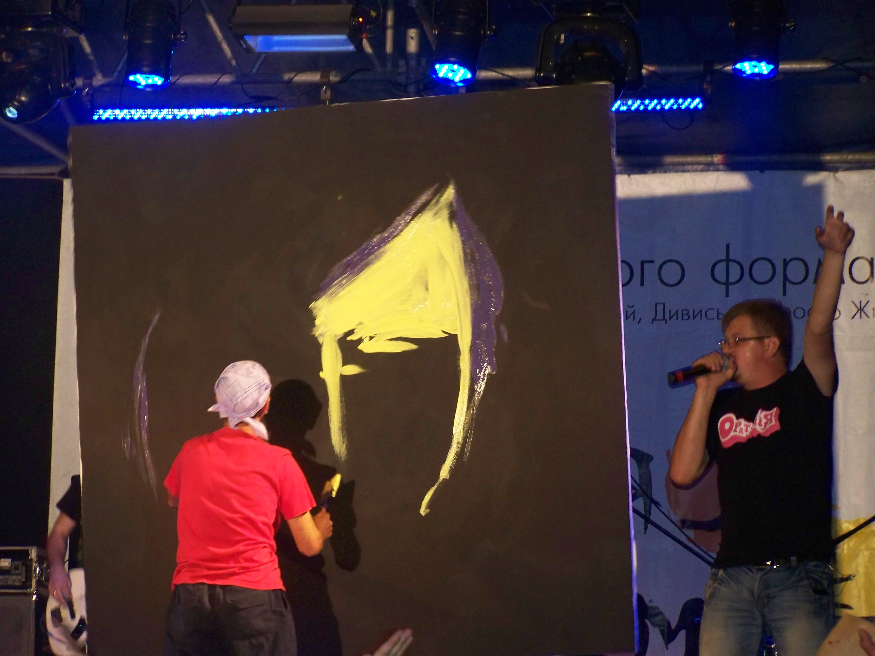 На фестивалі "Потяг до Яремче" Юрій Писар пише найбільший в Україні (а може і світі) портрет композитора Володимира Івасюка